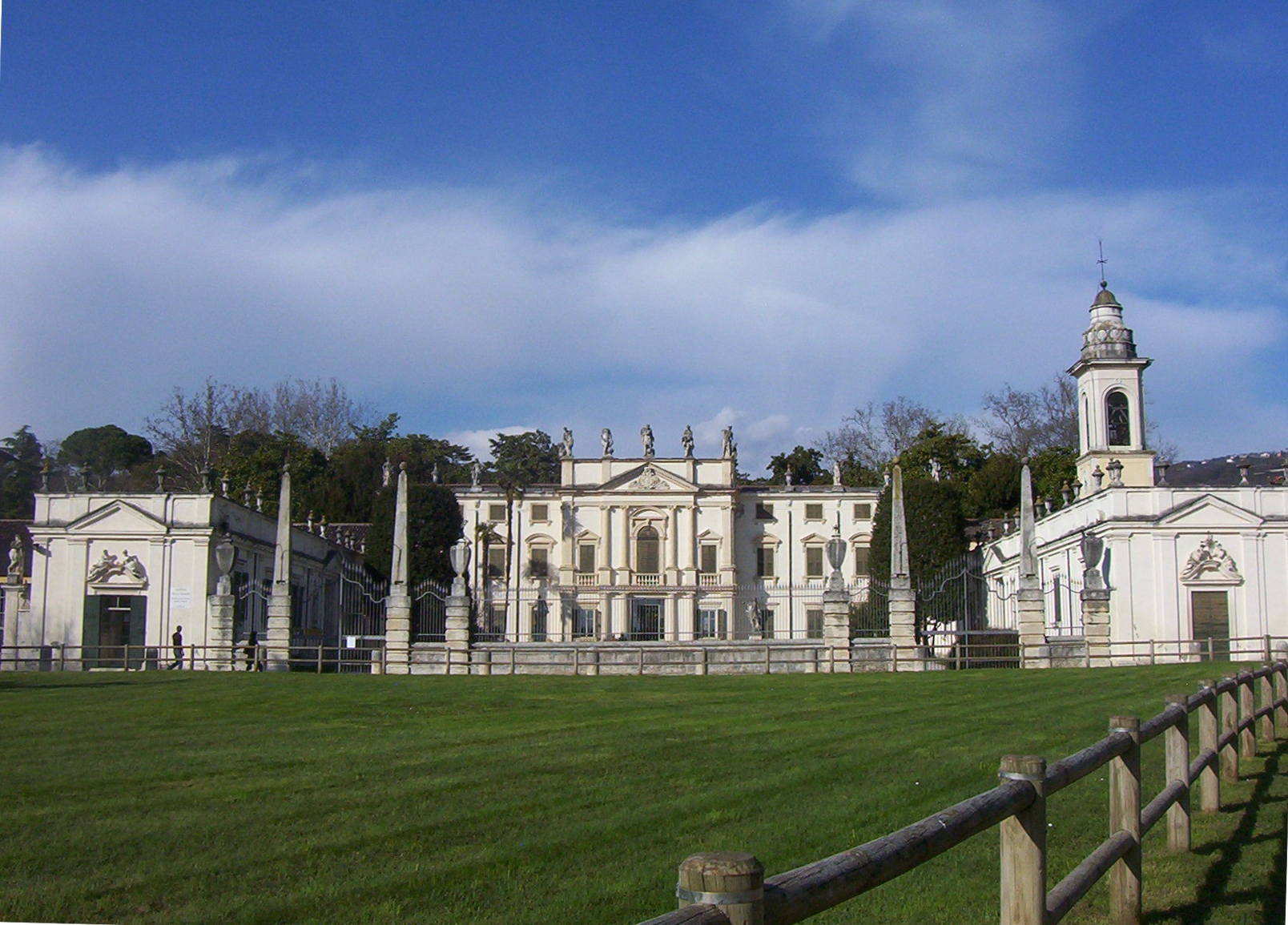 Vista frontale di villa Rizzardi a Negrar in località Novare, in Valpolicella (provincia di Verona)